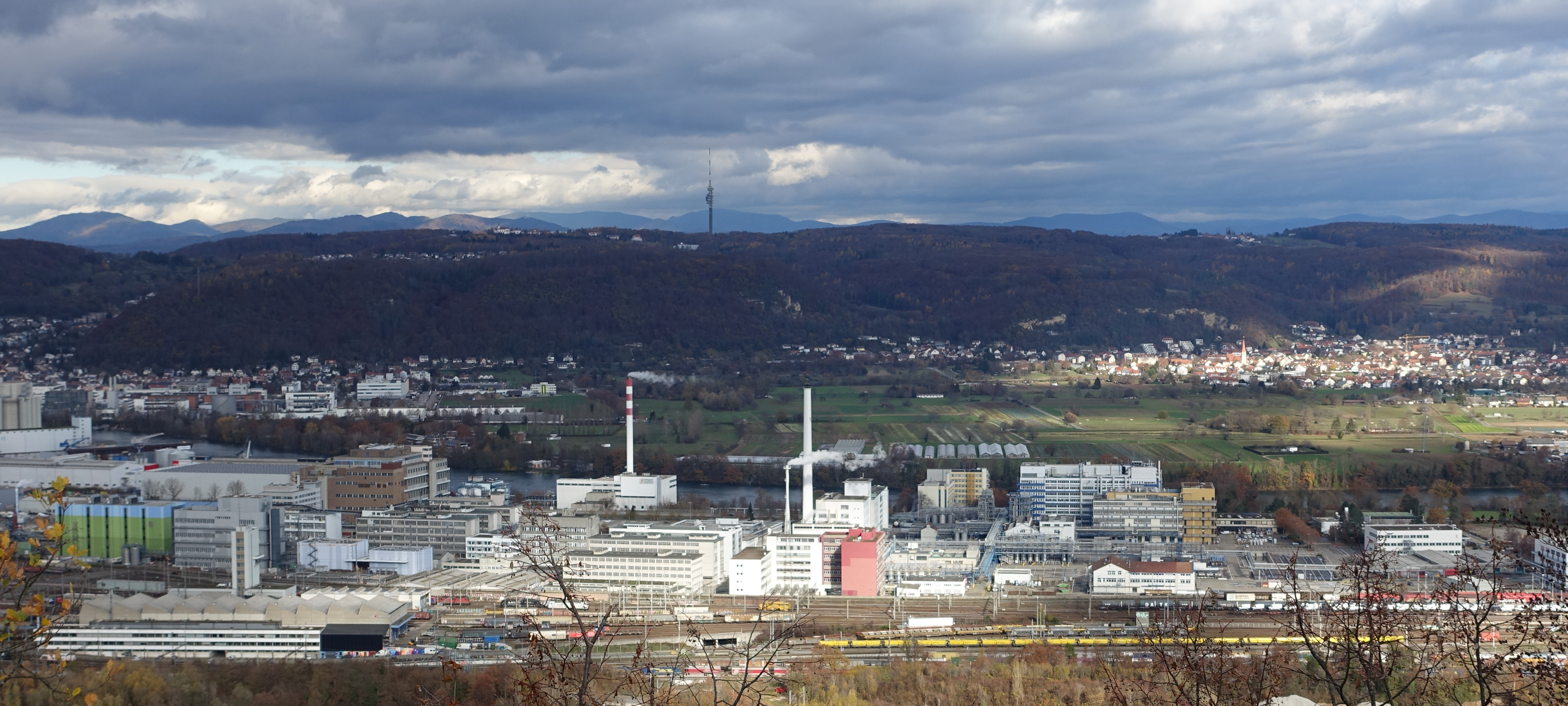 St.Chrischona-Panorama gesehen von der vorderen Burgruine Wartenberg in Muttenz, Schweizerhalle und Rhein im Vordergrund